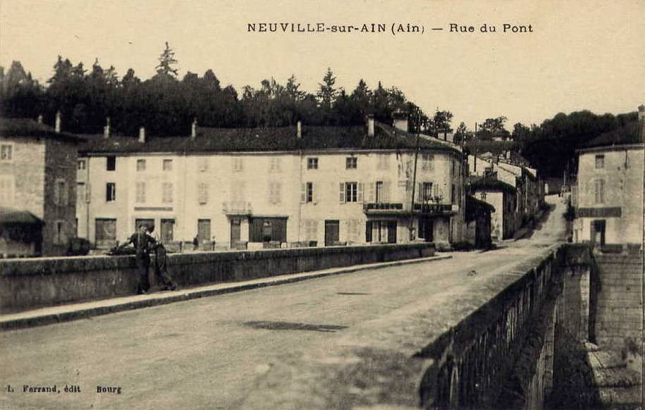 Carte postale ancienne du pont de-Neuville-sur-Ain.